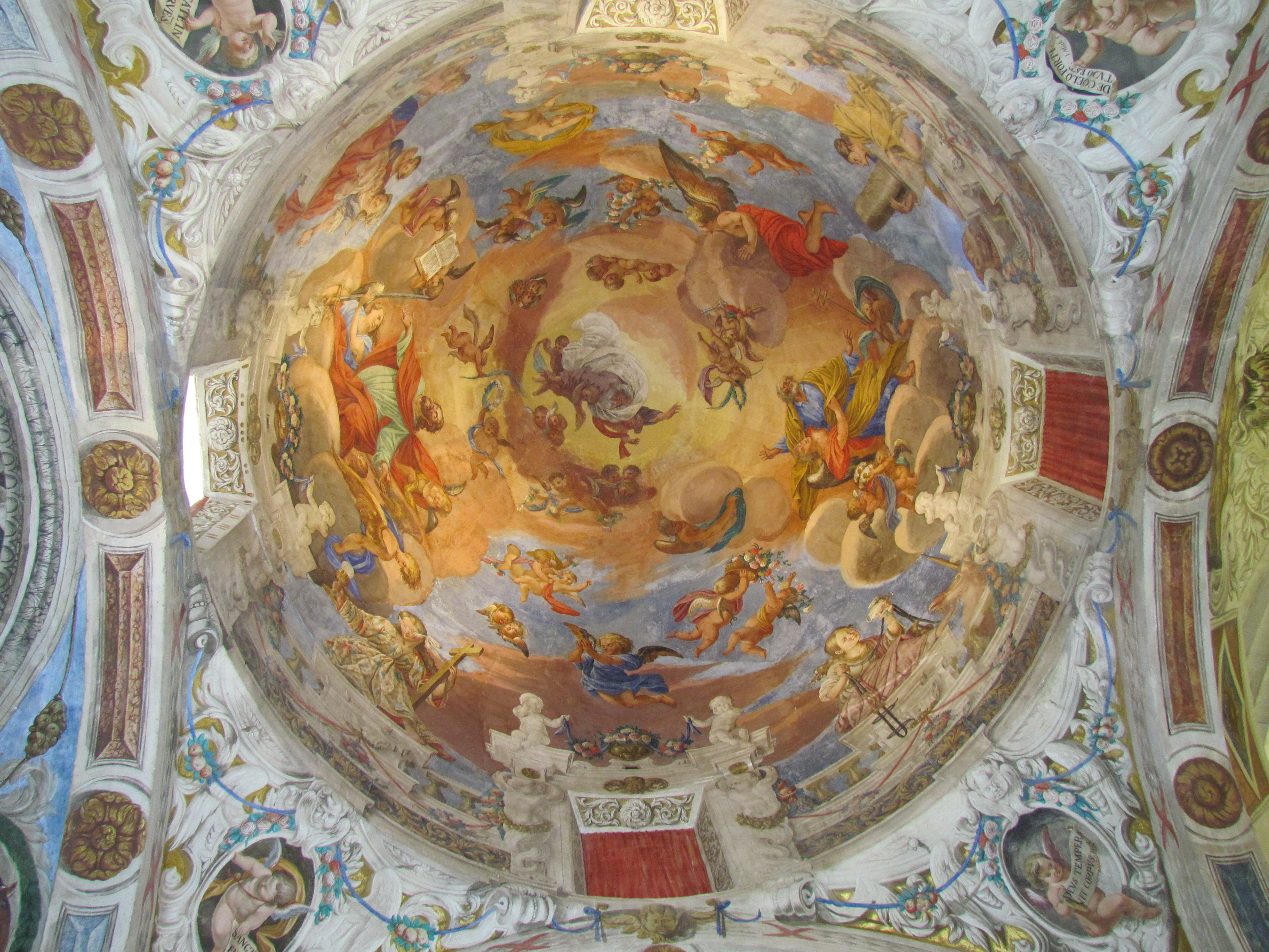 Cúpula de l'ermita de Sant Pau d'Albocàsser, Alt Maestrat (País Valencià). Apoteosi celestial de sant Pau (1689-1690), obra de Vicent Guilló Barceló.